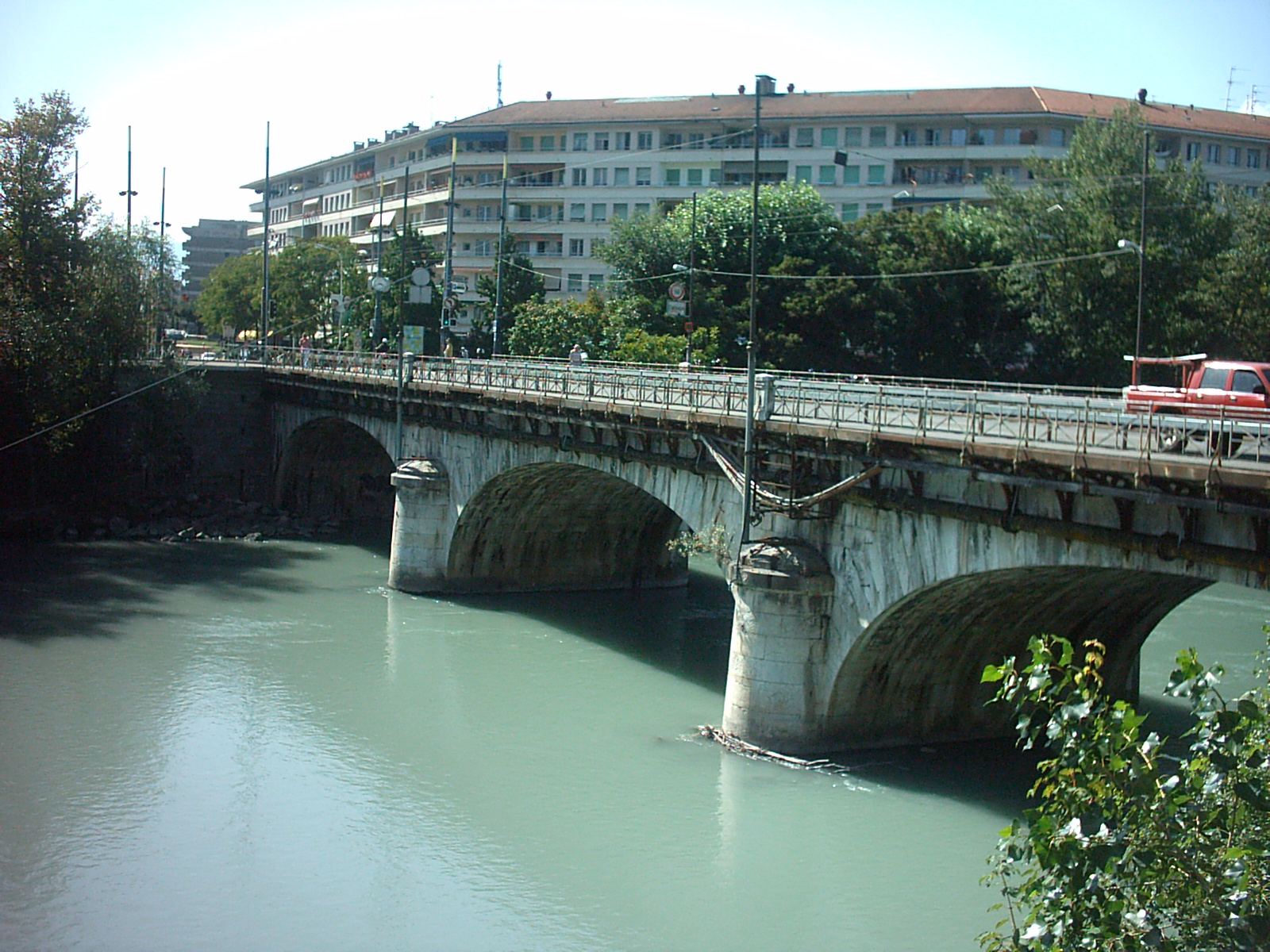 Pont de Carouge à Genève (Suisse)